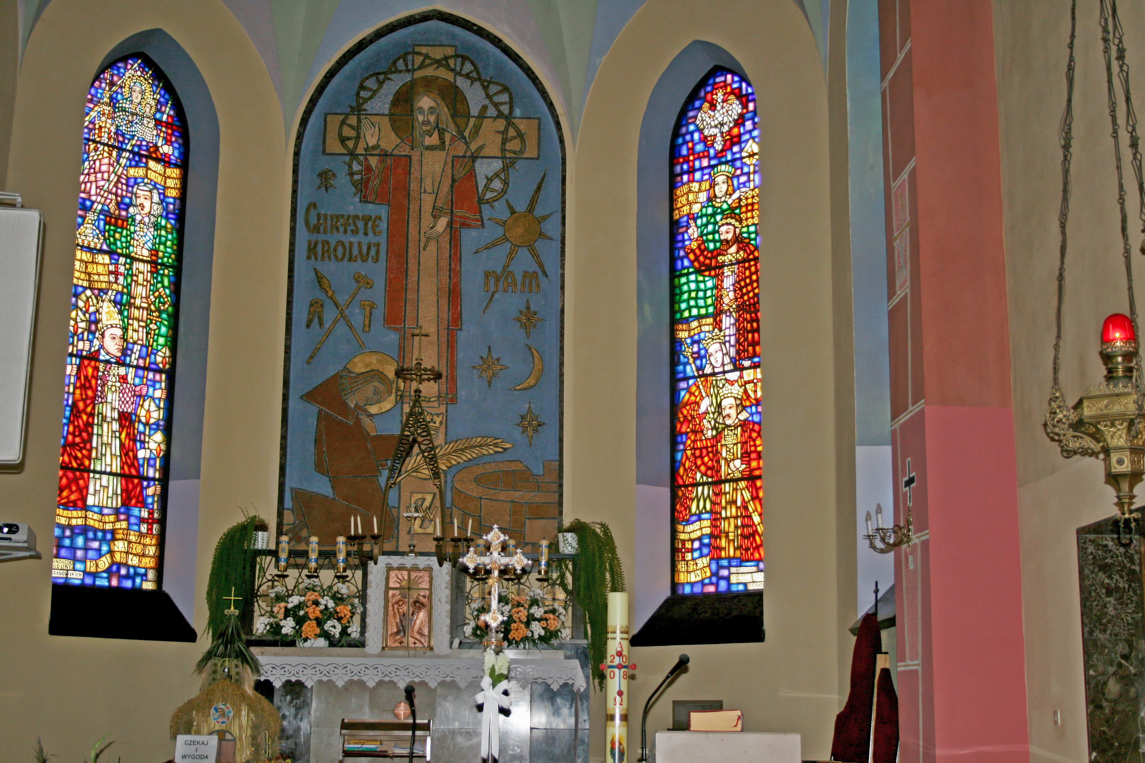 Wnętrze kościoła pw. św. Zygmunta w Pniowie. Projektował prof. Jan Budziło